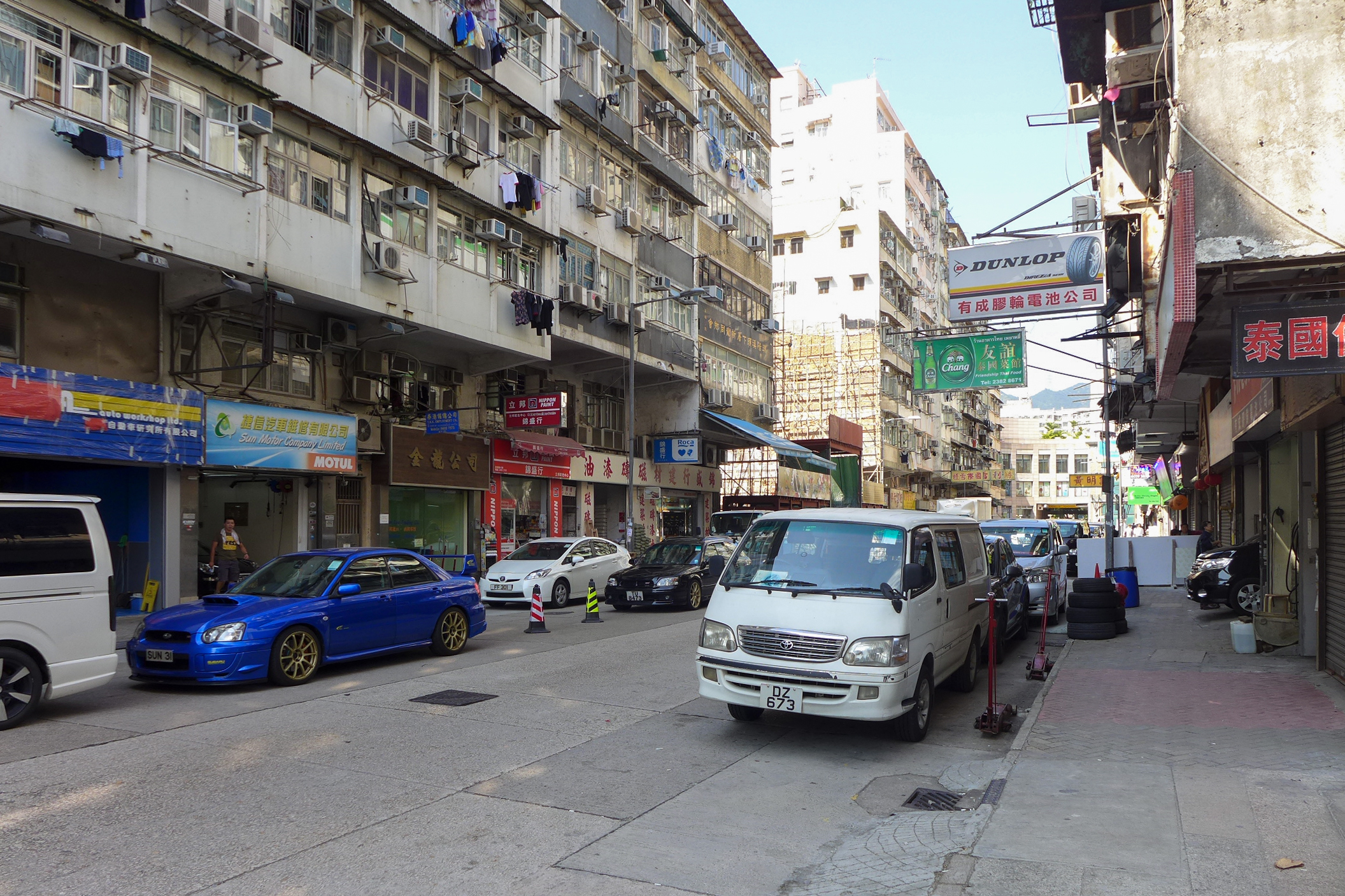 Kai Tak Road